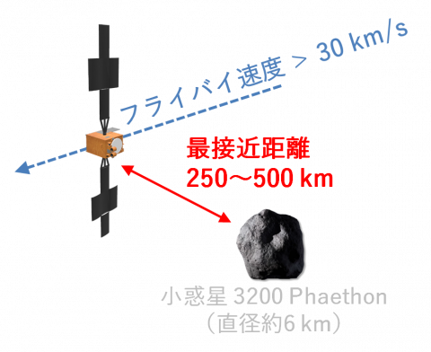 Ilustración de la sonda espacial DESTINY+ sobrevolando el asteroide 3200 Faetón